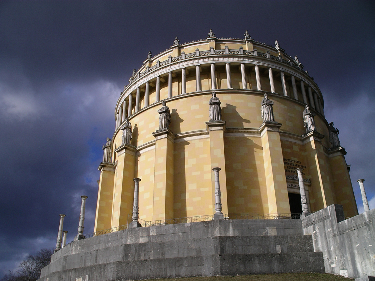 Befreiungshalle Kelheim, Außenansicht